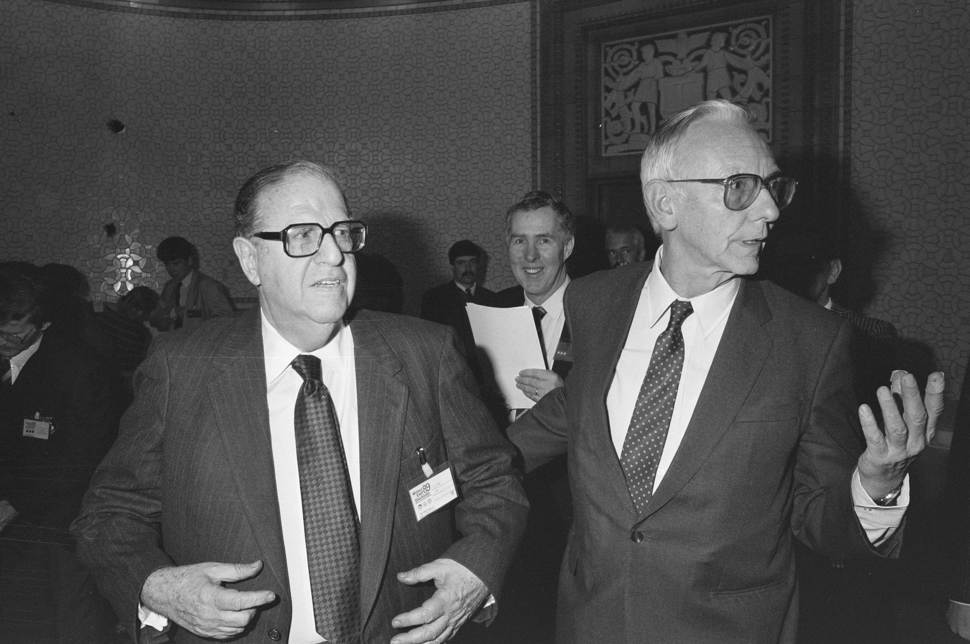 Collectie / Archief : Fotocollectie Anefo Reportage / Serie : Driedaagse Palestijnse/Israëlische conferentie in het Haagse Vredespaleis Beschrijving : Ex-minister Abba Eban van Israël en Max van der Stoel (lid Raad van State) Datum : 31 januari 1989 Locatie : Den Haag, Zuid-Holland Trefwoorden : conferenties Persoonsnaam : Eban, Abba, Stoel, Max van der Fotograaf : Croes, Rob C. / Anefo Auteursrechthebbende : Nationaal Archief Materiaalsoort : Negatief (zwart/wit) Nummer archiefinventaris : bekijk toegang 2.24.01.05 Bestanddeelnummer : 934-3976